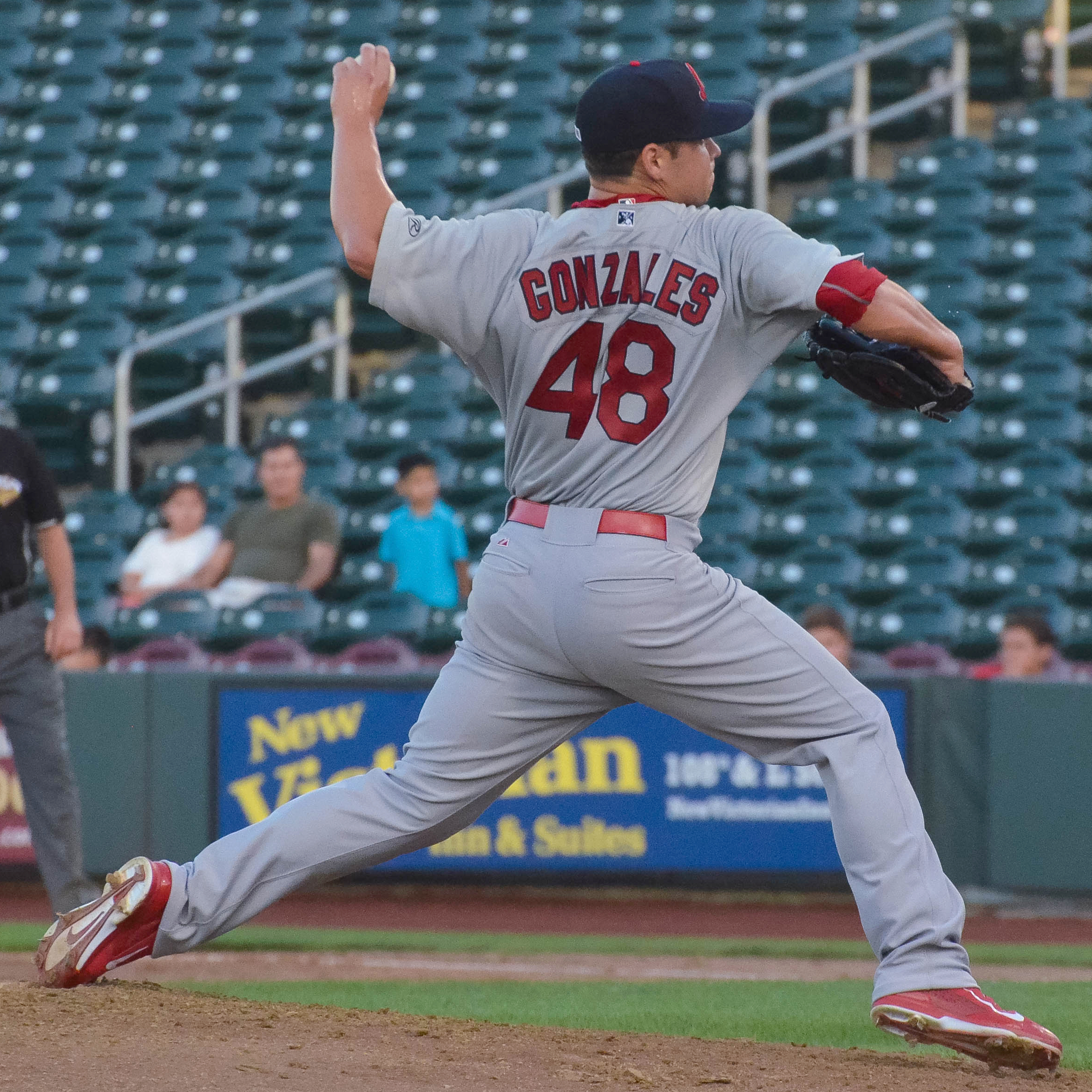 Marco Gonzales